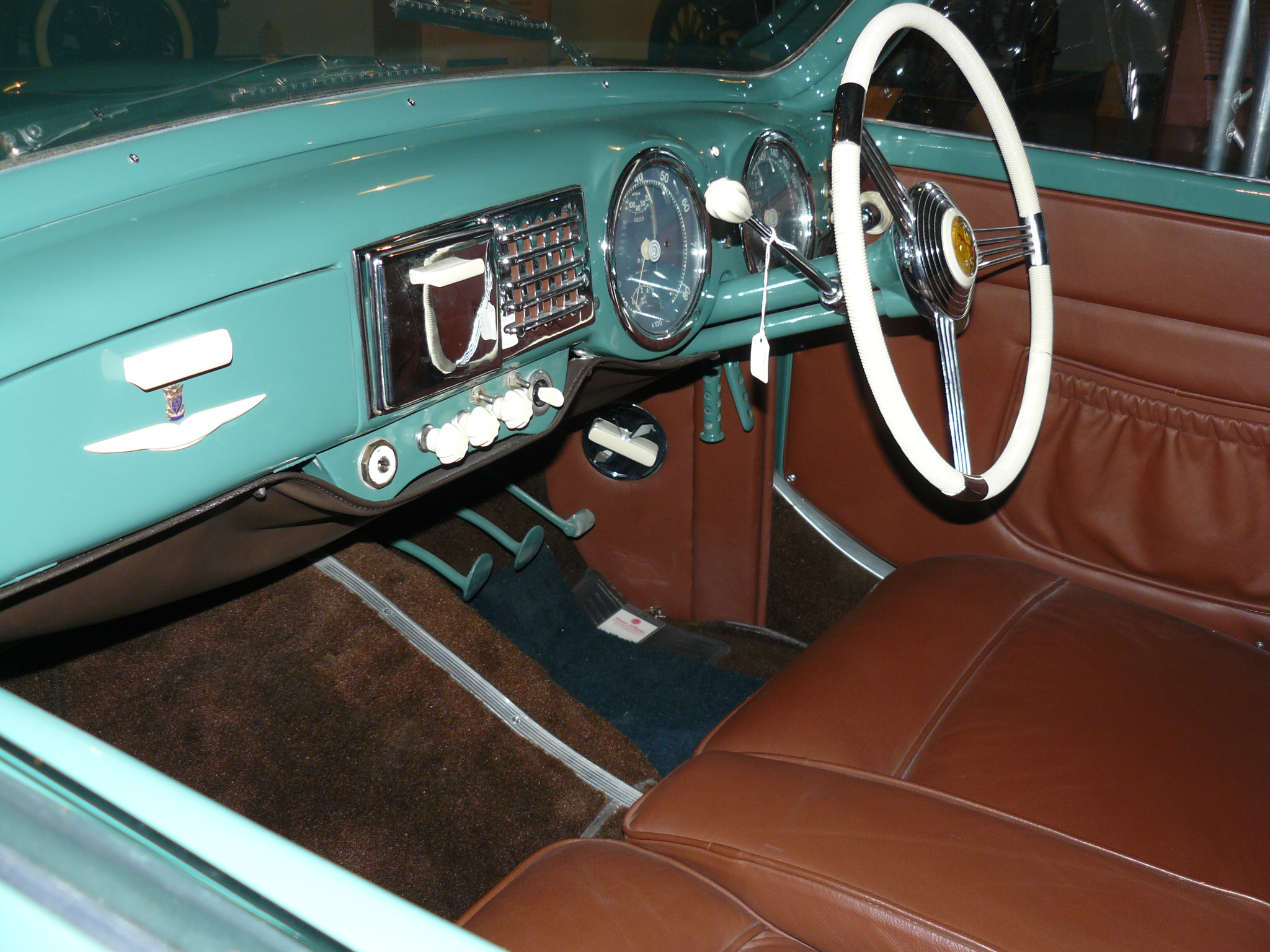 Auburn 2013